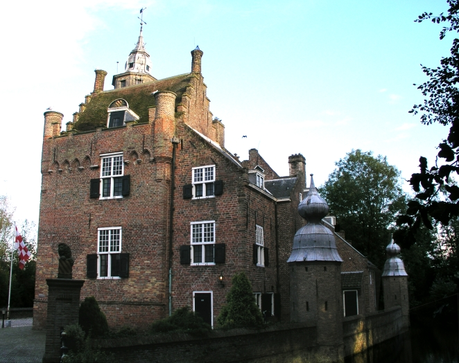 Schloss Moermond Fotografie erstellt August 2004 von Benutzer:yorg. Bild ist unter der GNU FDL zur weiteren Verwendung freigegeben. Quellenangabe: "yorg / 2004". Kategorie:Bild:Schloss